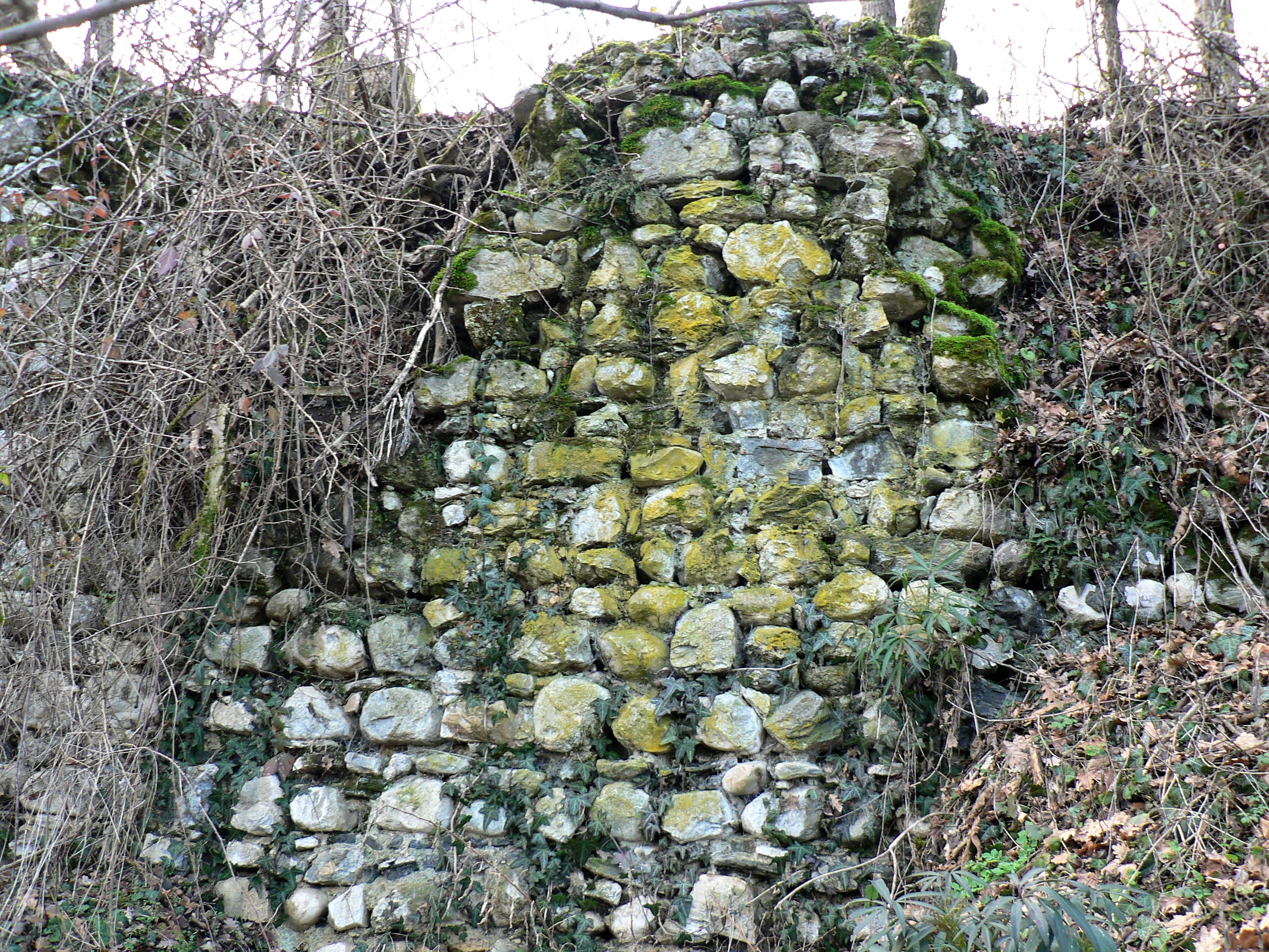 Vestiges du Château fort de La Buissière. La Buissière, Isère, AuRA, France.